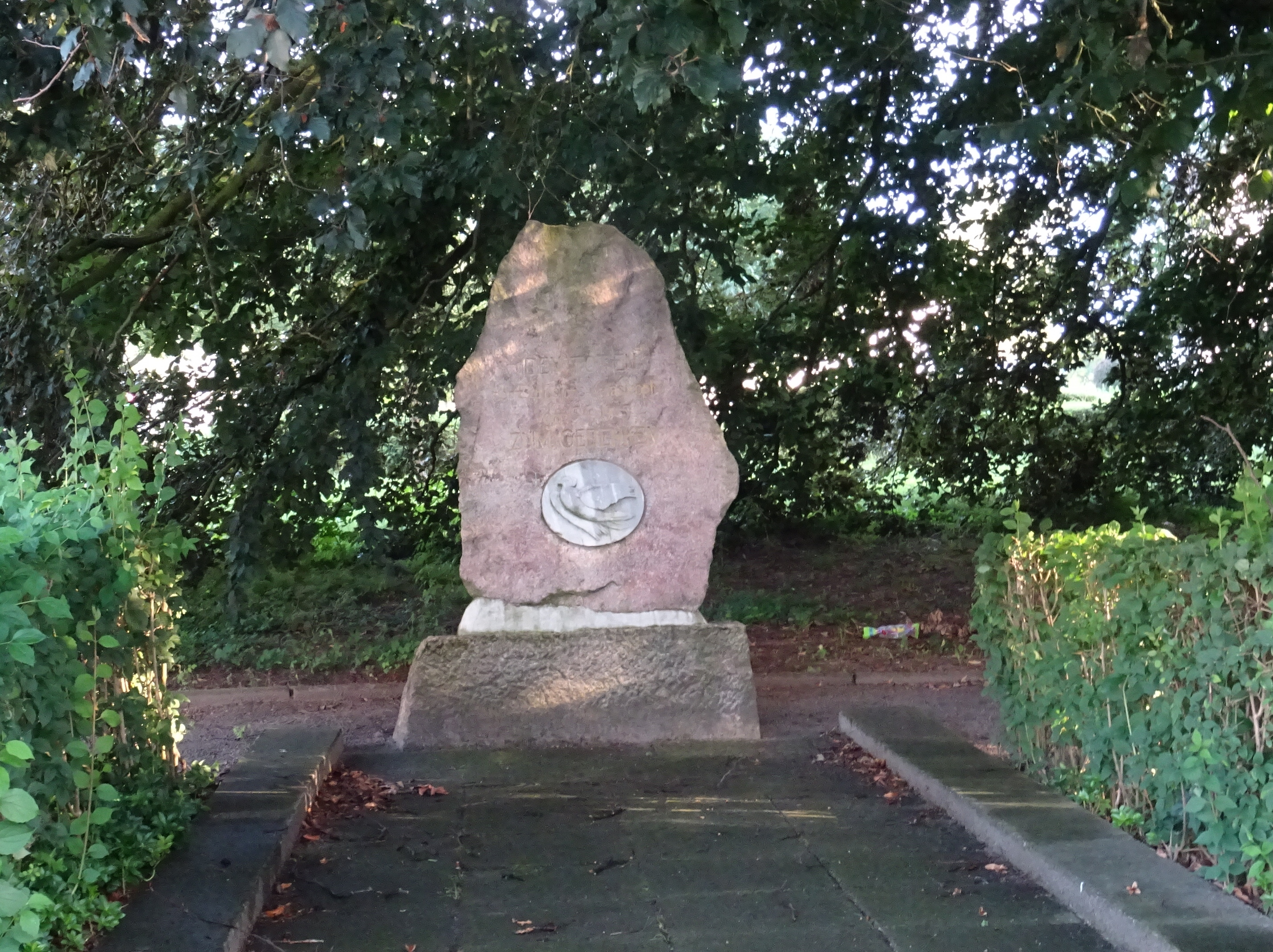 Pritzwalk, Gedenkstein für die Explosionskatastophe im Bahnhof 1945